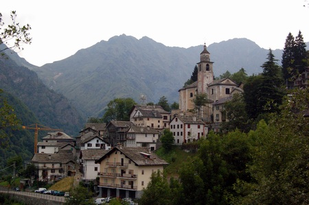 Rimella - Autore Fotogian